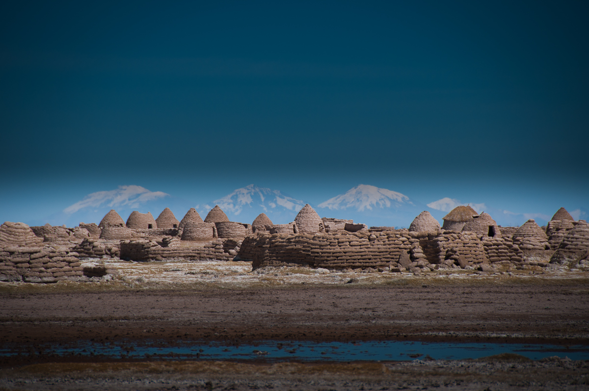 Esta foto se tomó el 4 de octubre, 2011 en Chipaya, Oruro, Bolivia, con una Nikon D90.